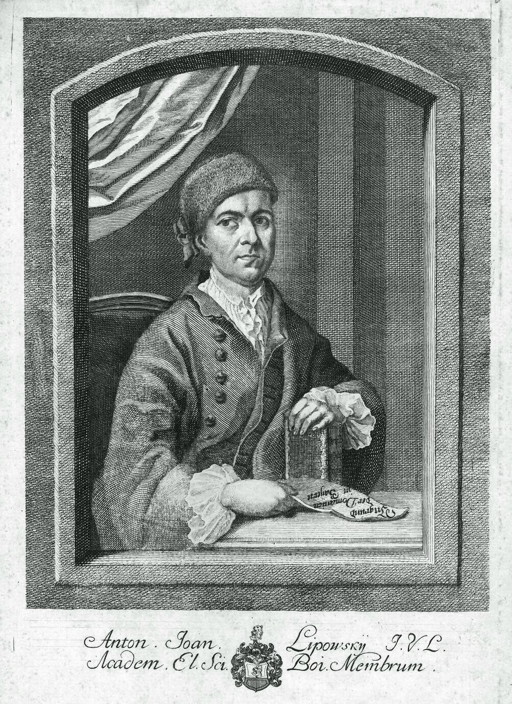 Anton Johann Lipowsky (1723–1780), Historiker und Jurist, mit Wappen derer Lipowsky zu Lipowitz in Böhmen